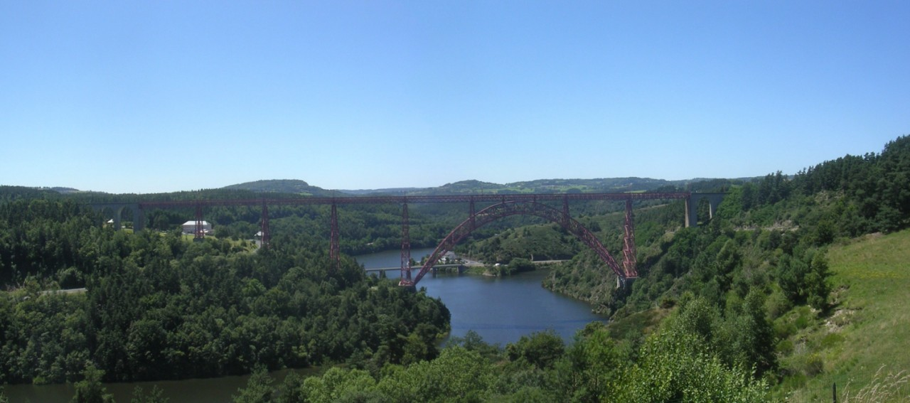 La Truyère et le viaduc de Garabi